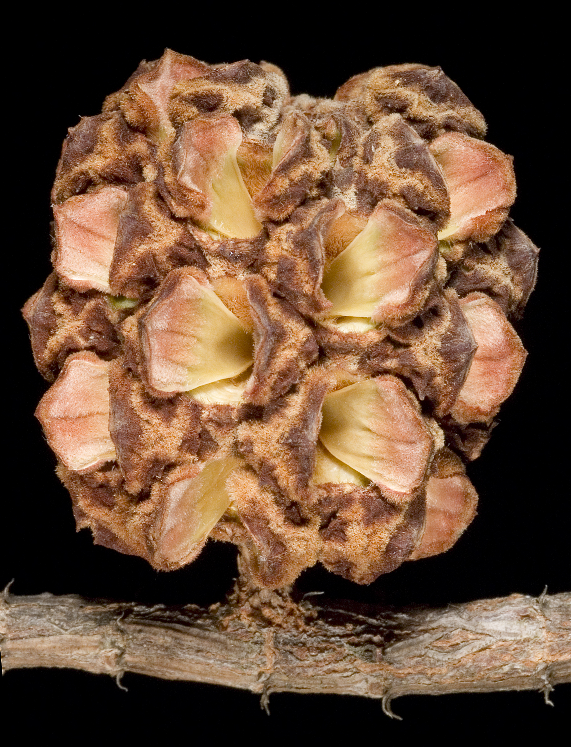 KRT3189